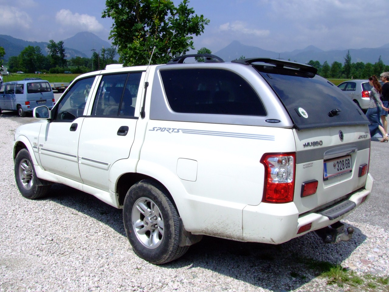 Quelle: selbst fotografiert, 06/2007 Fotograf: Späth Chr.